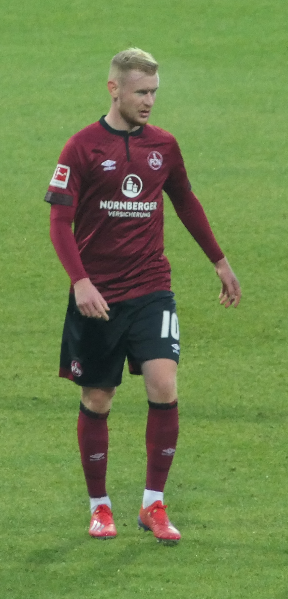 Der Fussballprofi Sebastian Kerk vom 1.FC Nürnberg beim Heimspiel gegen Werder Bremen am 02.02.2019.